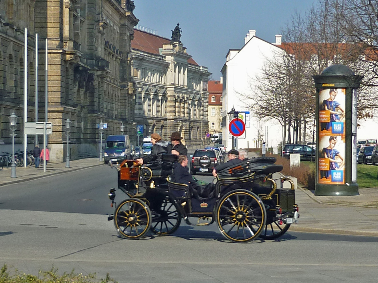 Altes Automobil in der Landhausstr. in Dresden